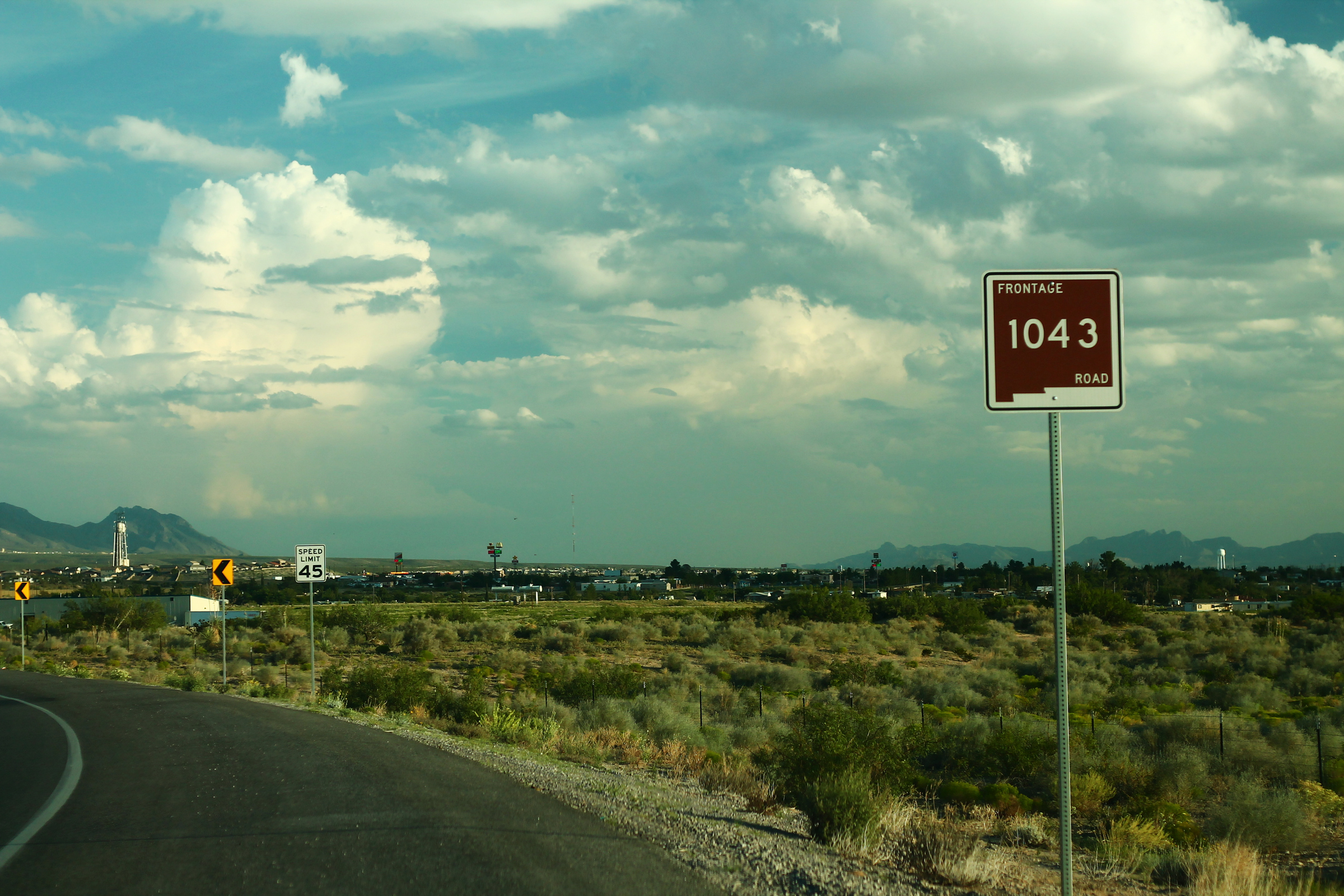 NM1043FrontageSignRoadside